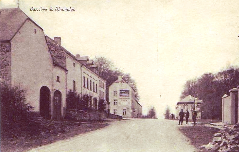 Vue de la barrière de Champlon (N4 vers Marche), à gauche l'Hostellerie et xx. A droite la gendarmerie et (l'ancien octroi ?)